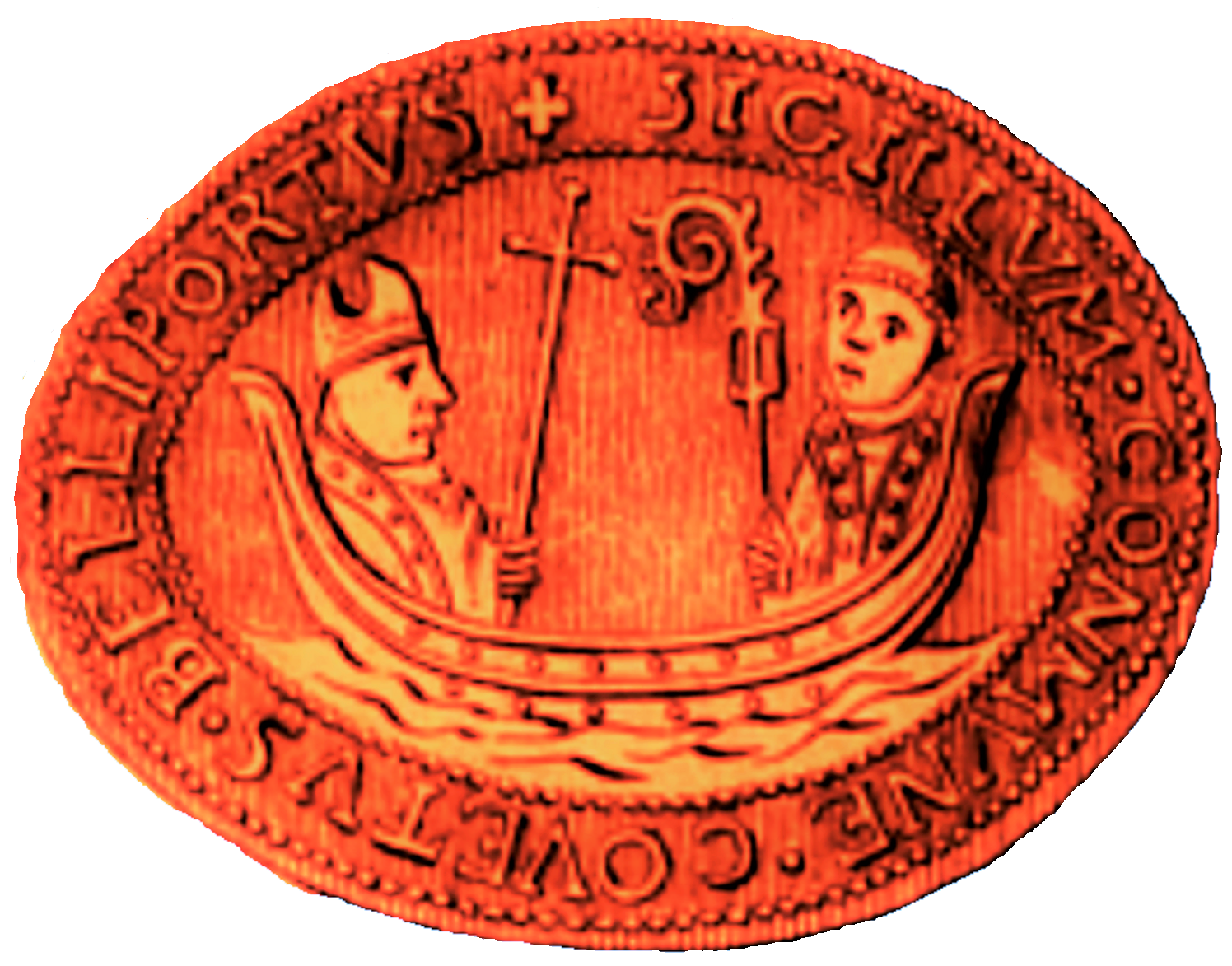 Paimpol, Côtes-d'Armor, Abbaye de Beauport, Sceau (image du domaine public modifiée)